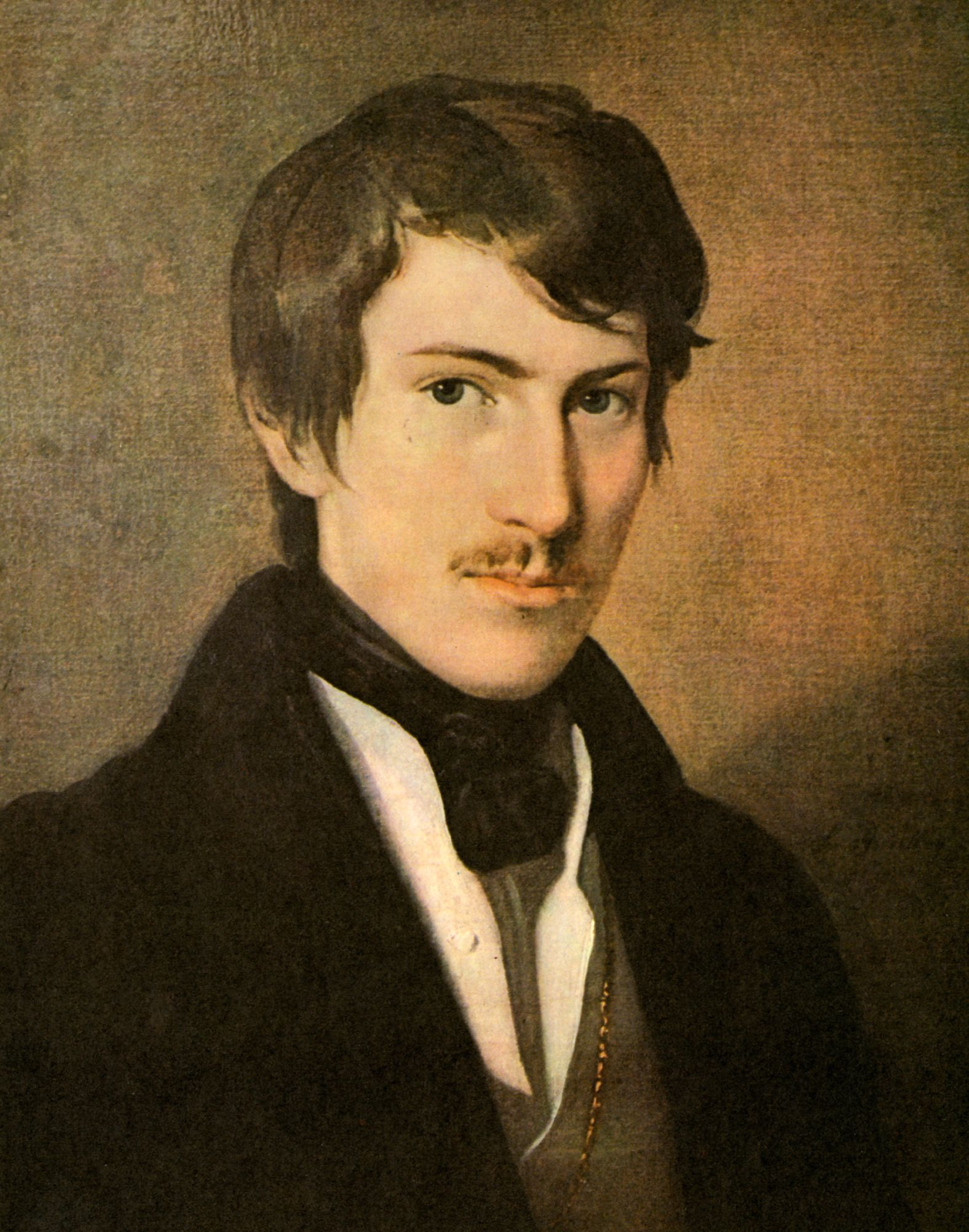 Austrian poet Nikolaus Lenau (13 August 1802 - 22 August 1850)